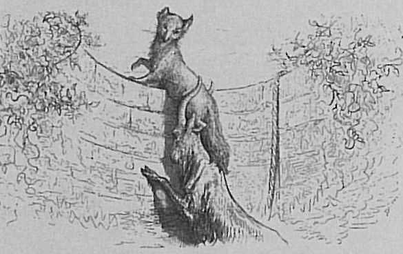 illustration for Jean de La Fontaine's fables by Gustave Doré